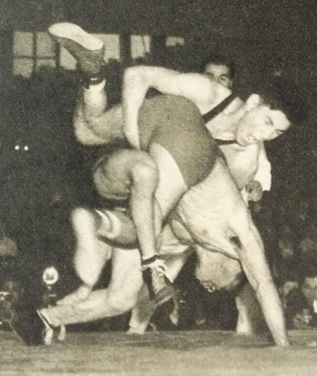 1954年度レスリング世界選手権大会での笹原正三（上）とニコライ・ムザシヴィリ（下）